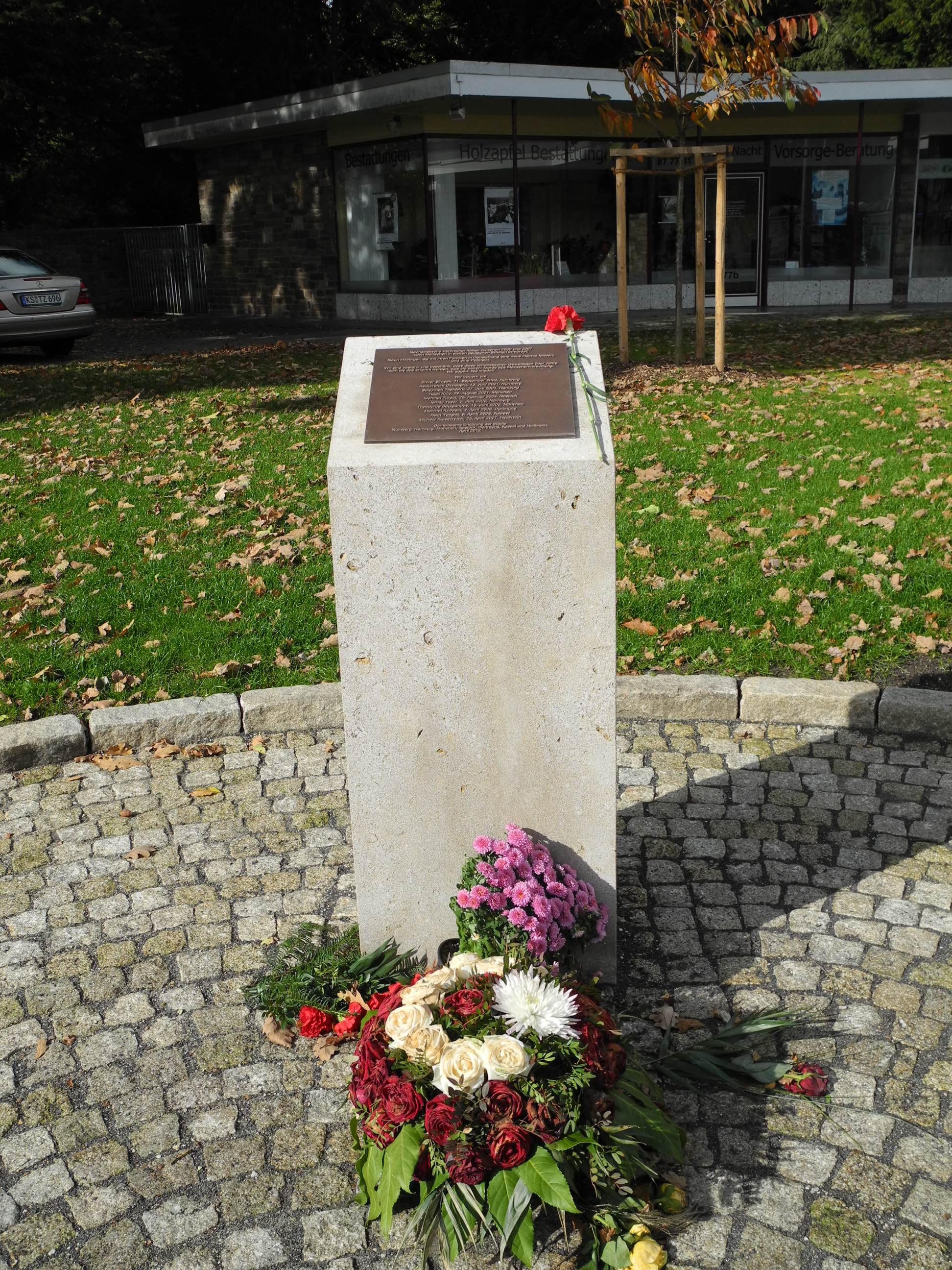 Halitplatz, Kassel, Stele